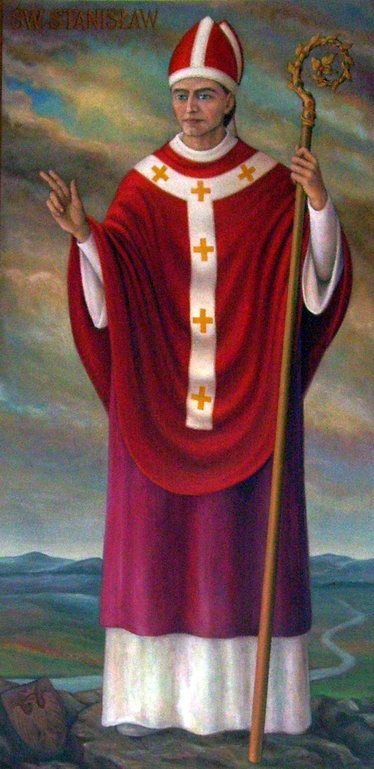 Obraz drugiego patrona parafii pw. Matki Boskiej Różańcowej i św. Stanisława Biskupa i Męczennika w Łodzi na Stokach - Sikawie wiszący w kościele parafialnym.